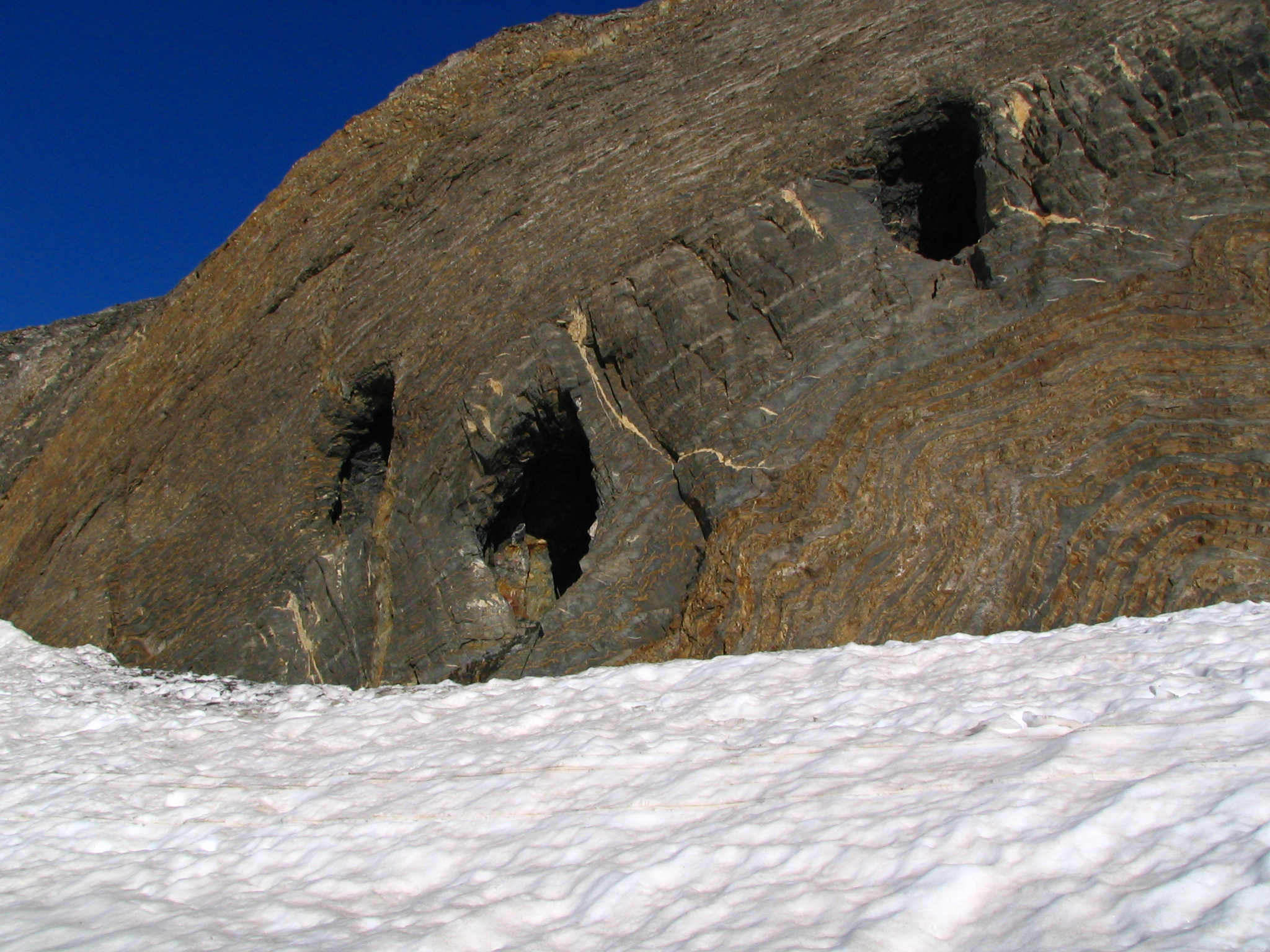 Grottes Russell, au dessus du glacier d'Ossoue (massif du Vignemale)